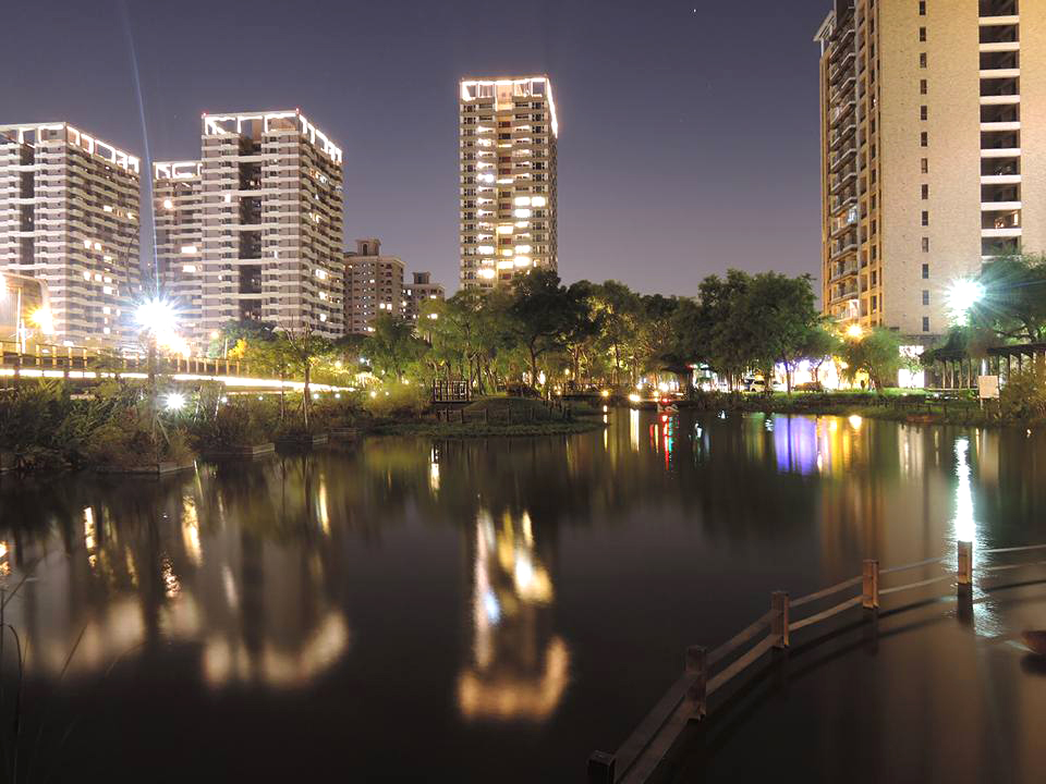 桃園市八德區廣豐公園夜景